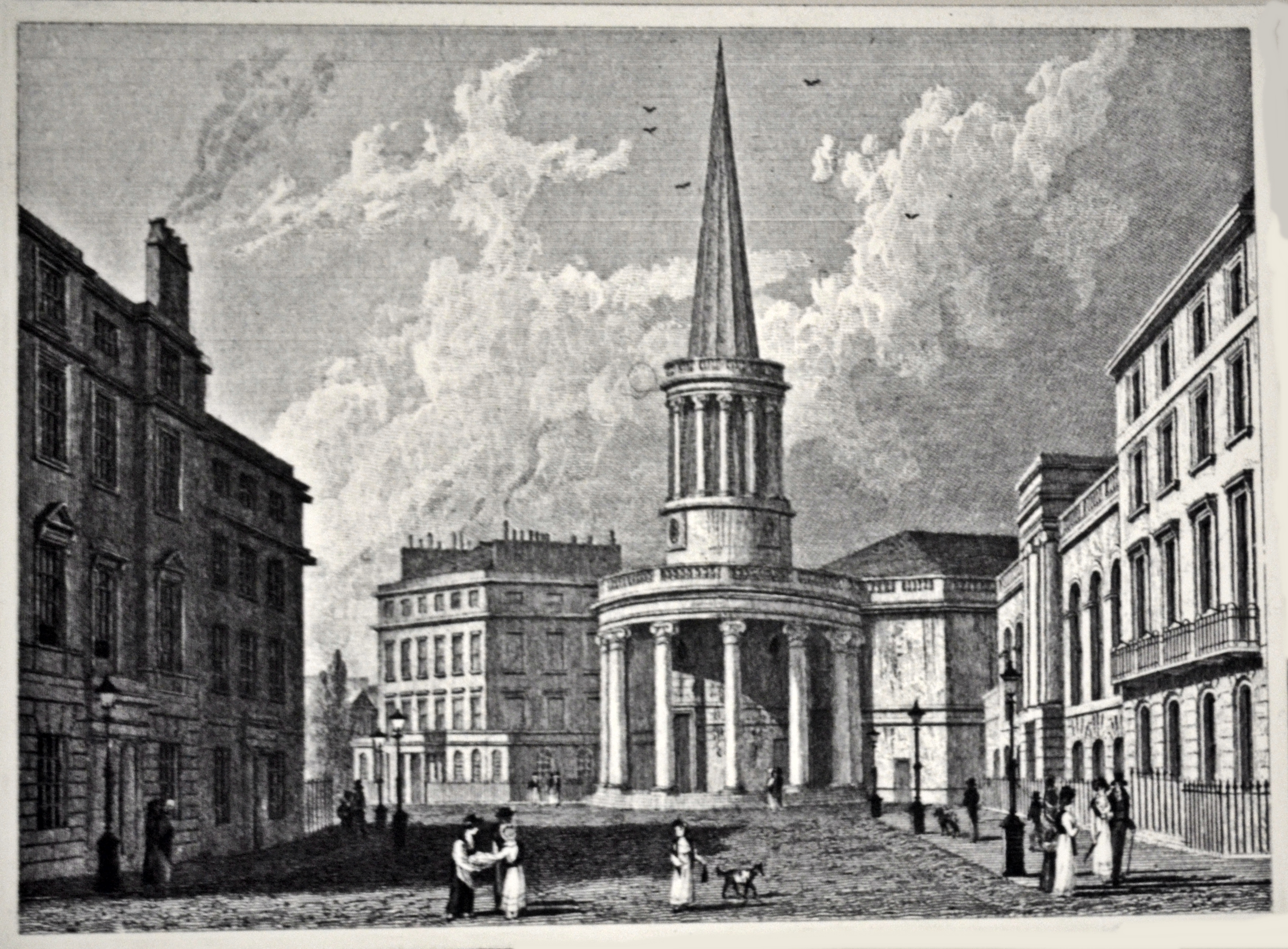 Église All Souls, Langham Place, Londres, par William Westall (1825).